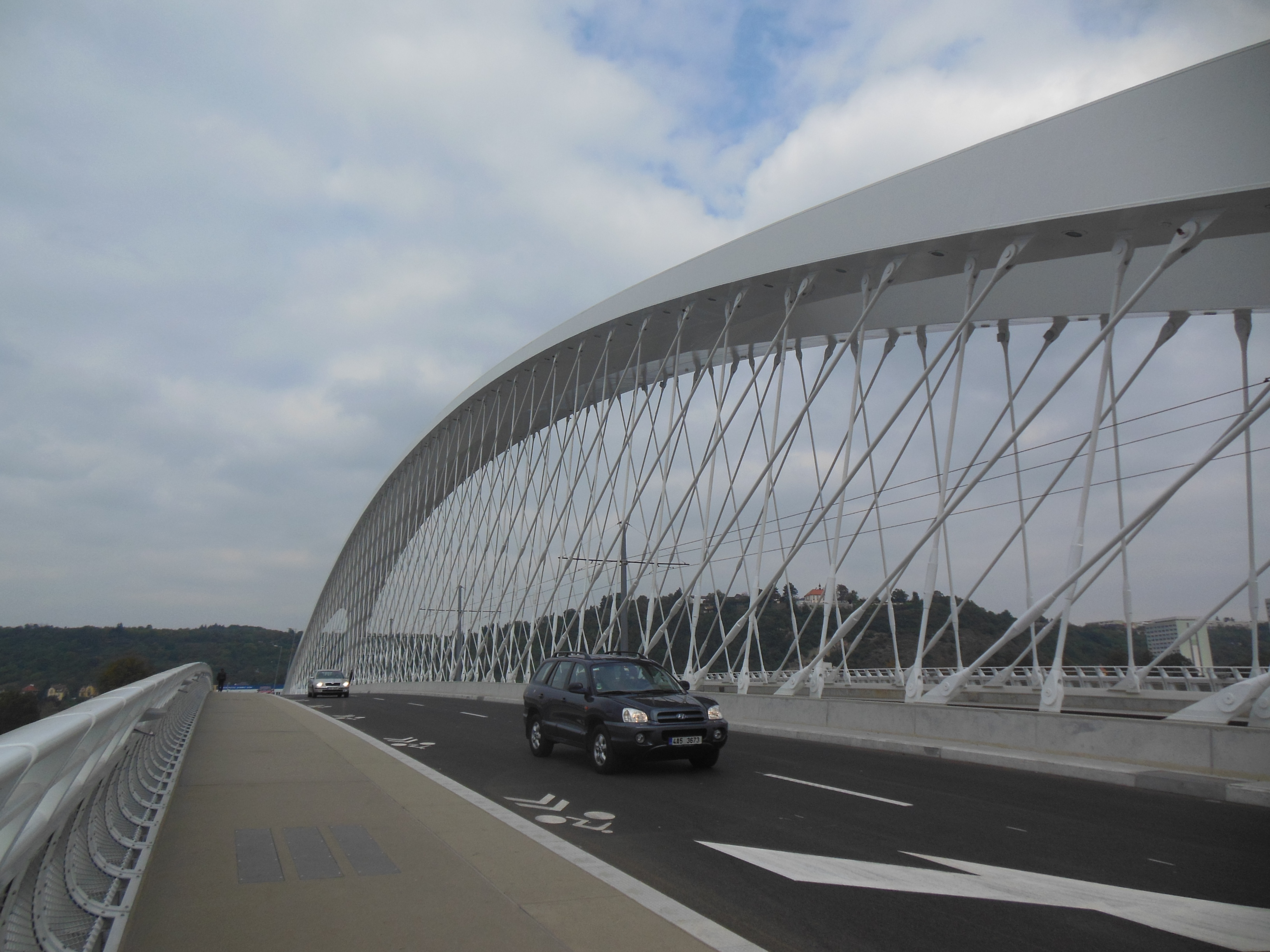 Praha-Holešovice. Trojský most.